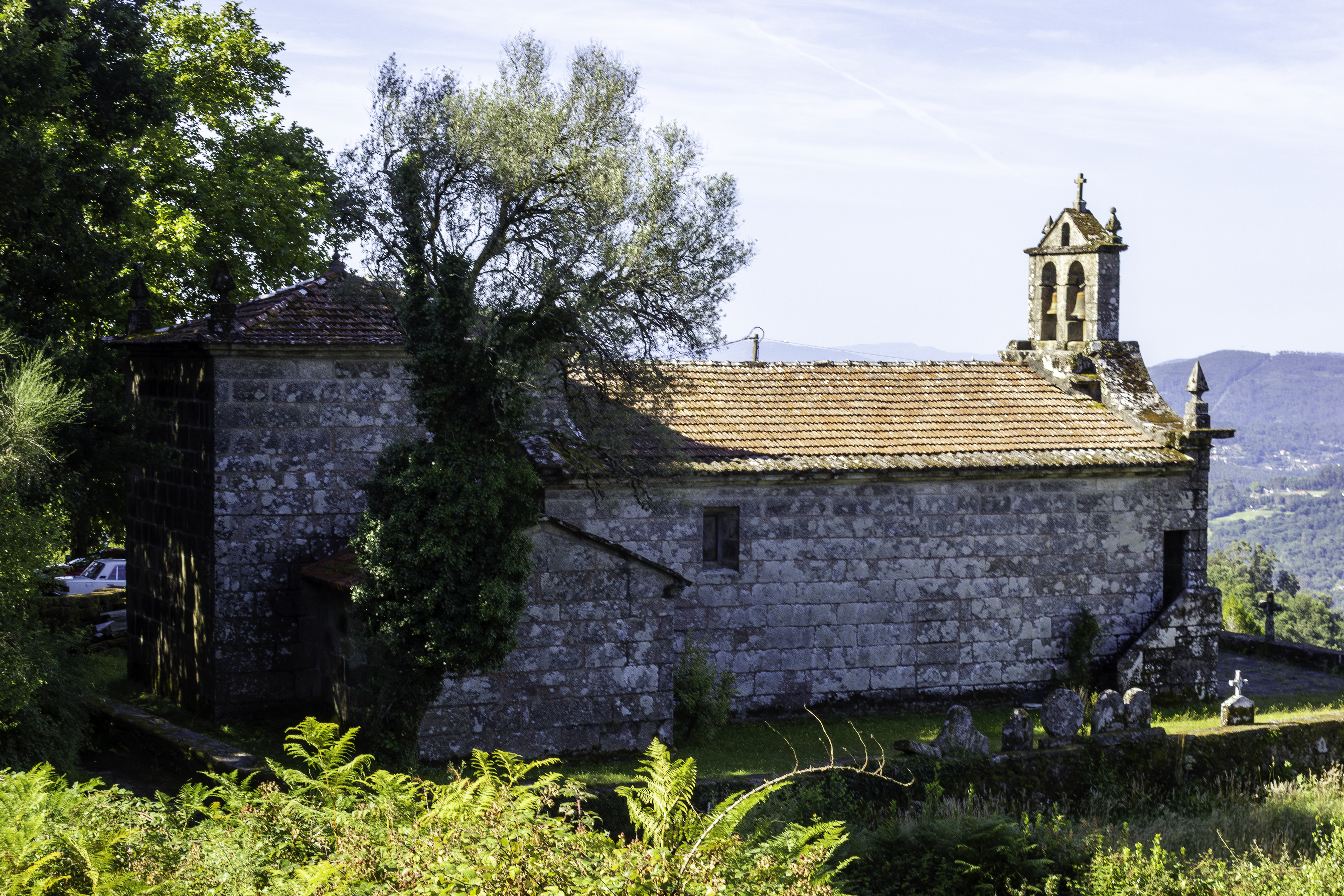 Igrexa de San Xoán do Piñeiro, no concello de Covelo.